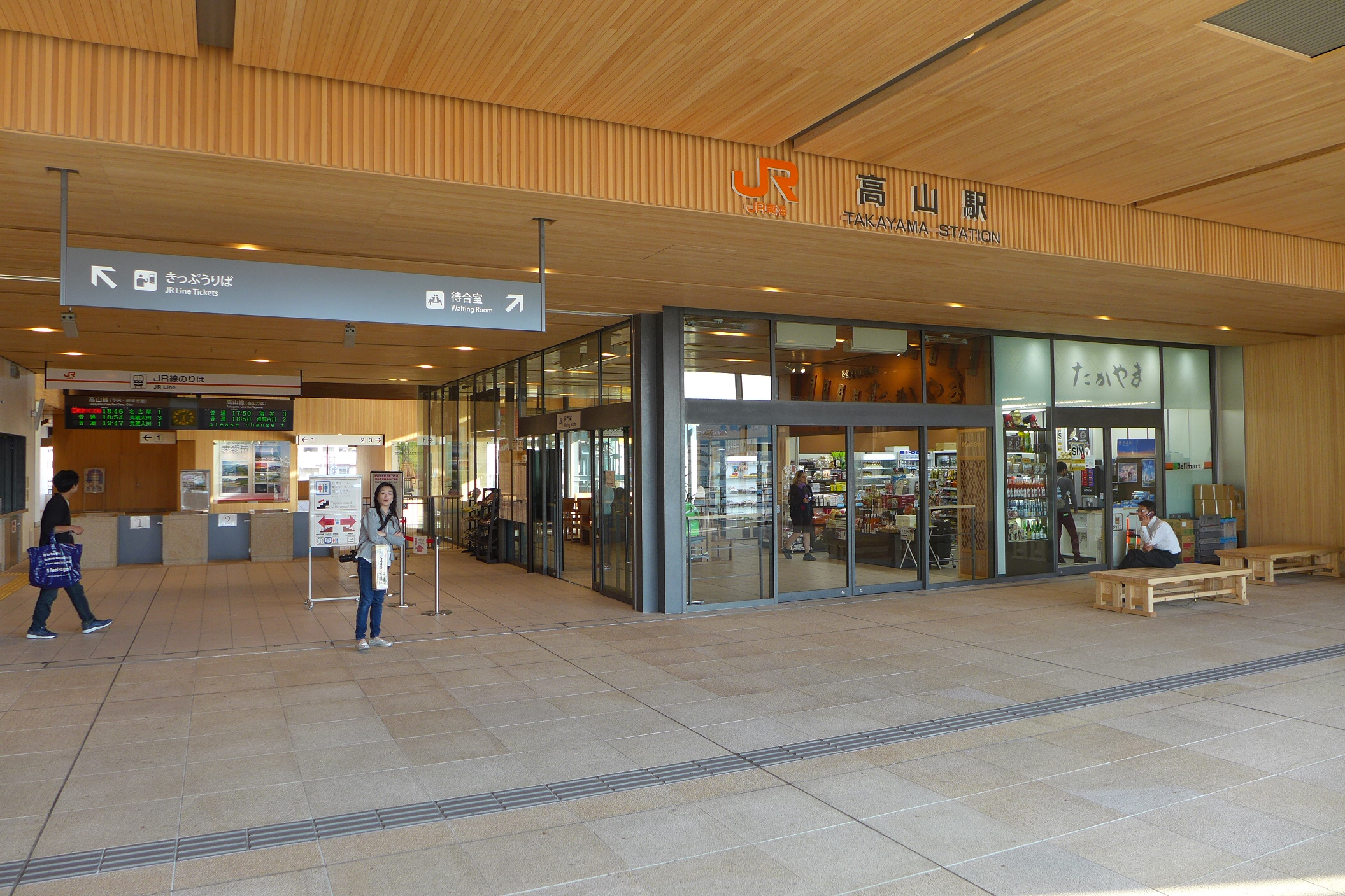 Takayama Station